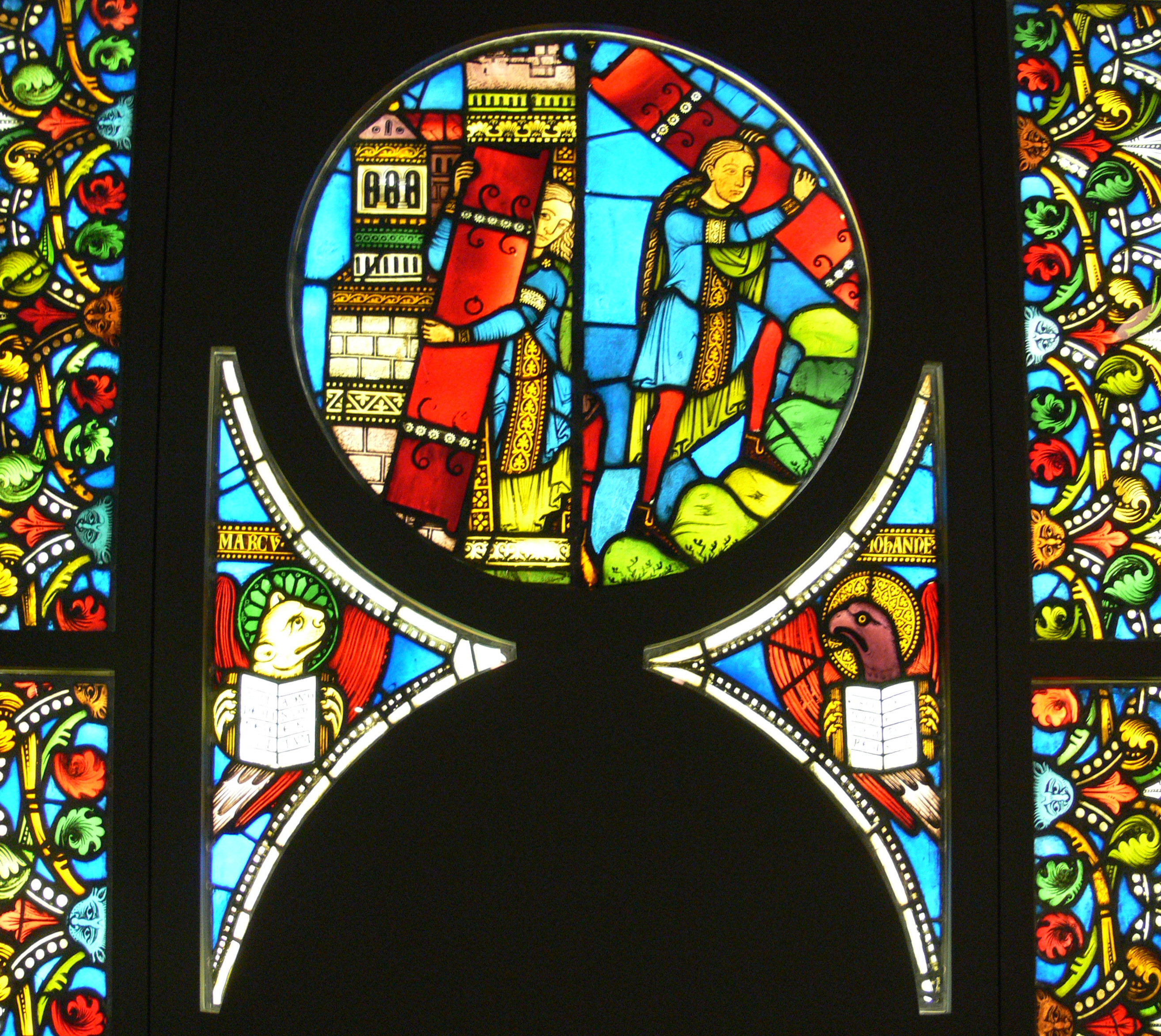 Glasfenster aus Kloster Alpirsbach: Samson trägt die Tore der Stadt Gaza auf den Berg bei Hebron Symbol des Evangelisten Markus Symbol des Evangelisten Johannes Ornamentstreifen Straßburg, um 1160-1170 Württembergisches Landesmuseum Stuttgart, Inv. Nr. 8686